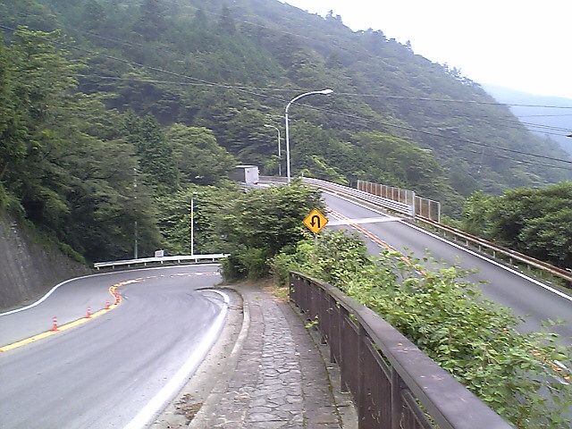 旧東海道と箱根新道